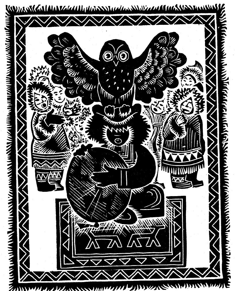 Иллюстрация к книге "Эскимосские сказки и легенды". Художник Д. А. Брюханов